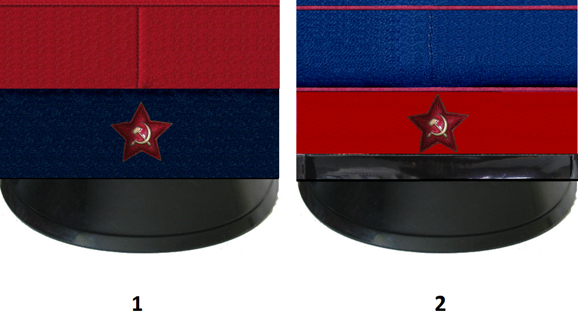 Фуражки ГПУ24